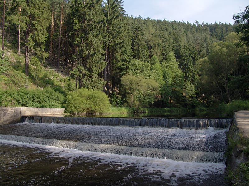 Author: David Braunstein